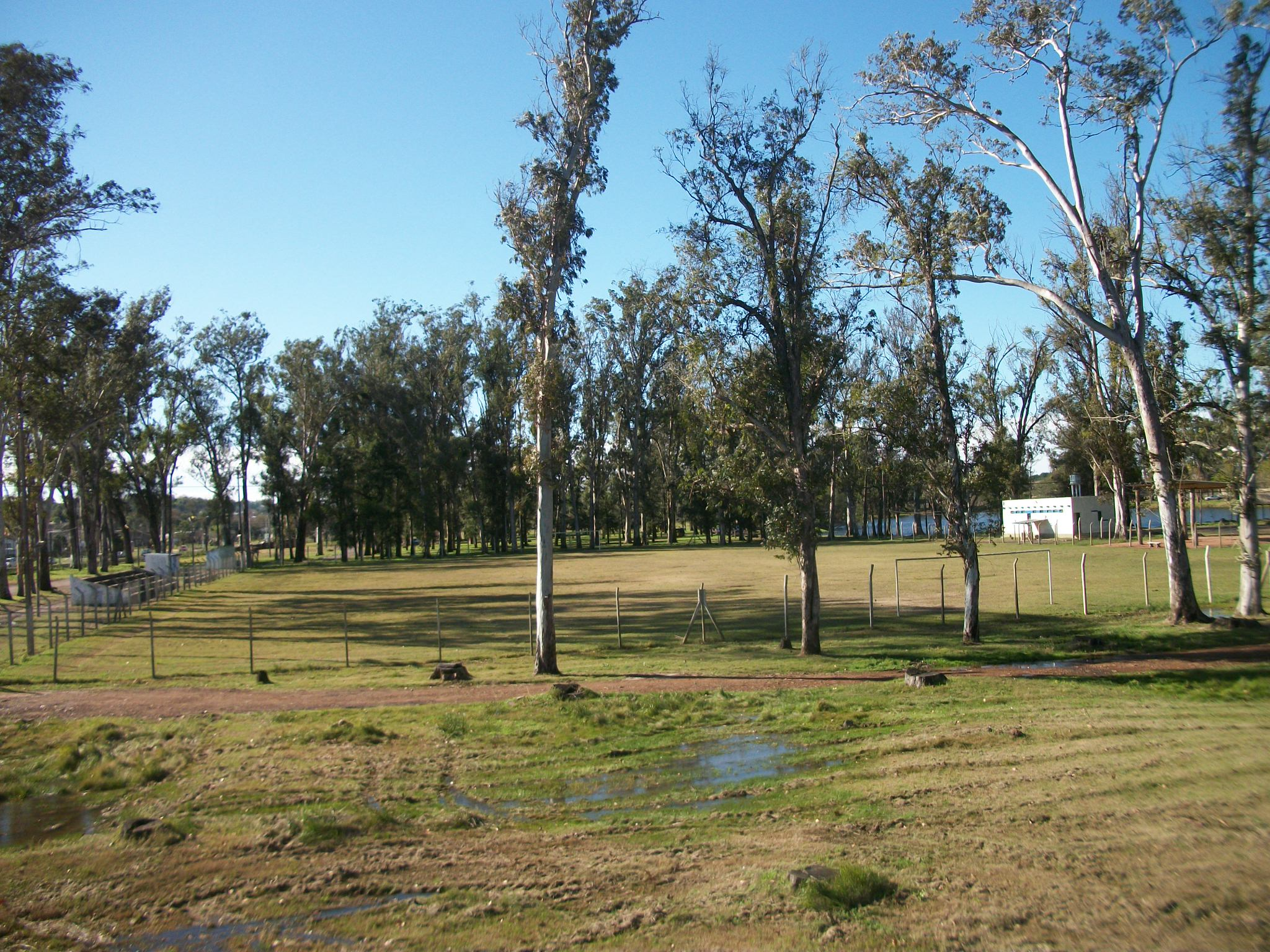 Cancha Parque 25 Tacuarembó